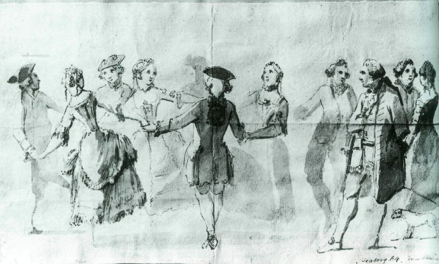 Dans på Sveaborg 1764, möjligen inledningen till en menuett. Lavering av Elias Martin. Nationalmuseum, Stockholm.